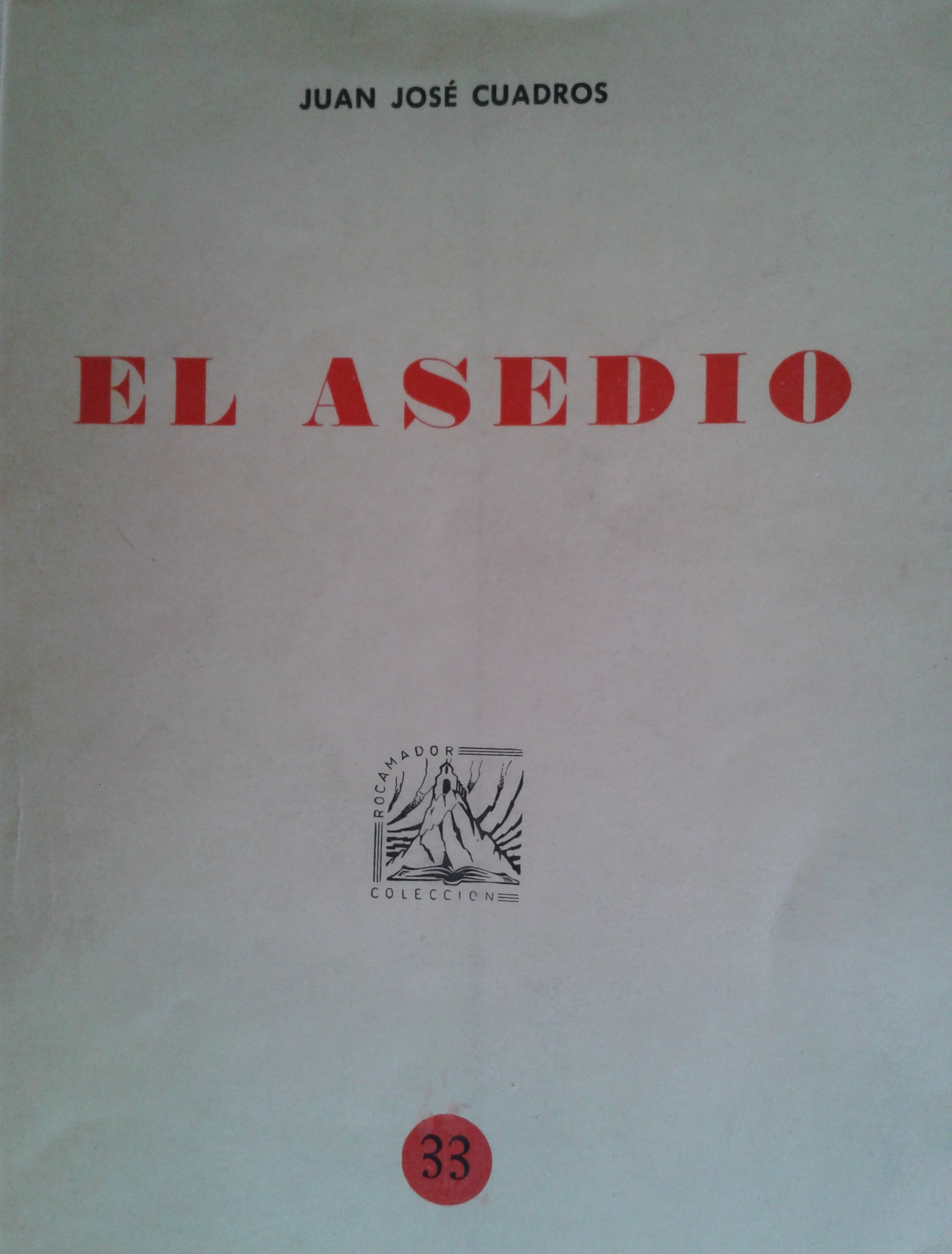 El Asedio (poesía) de Juan José Cuadros 1963